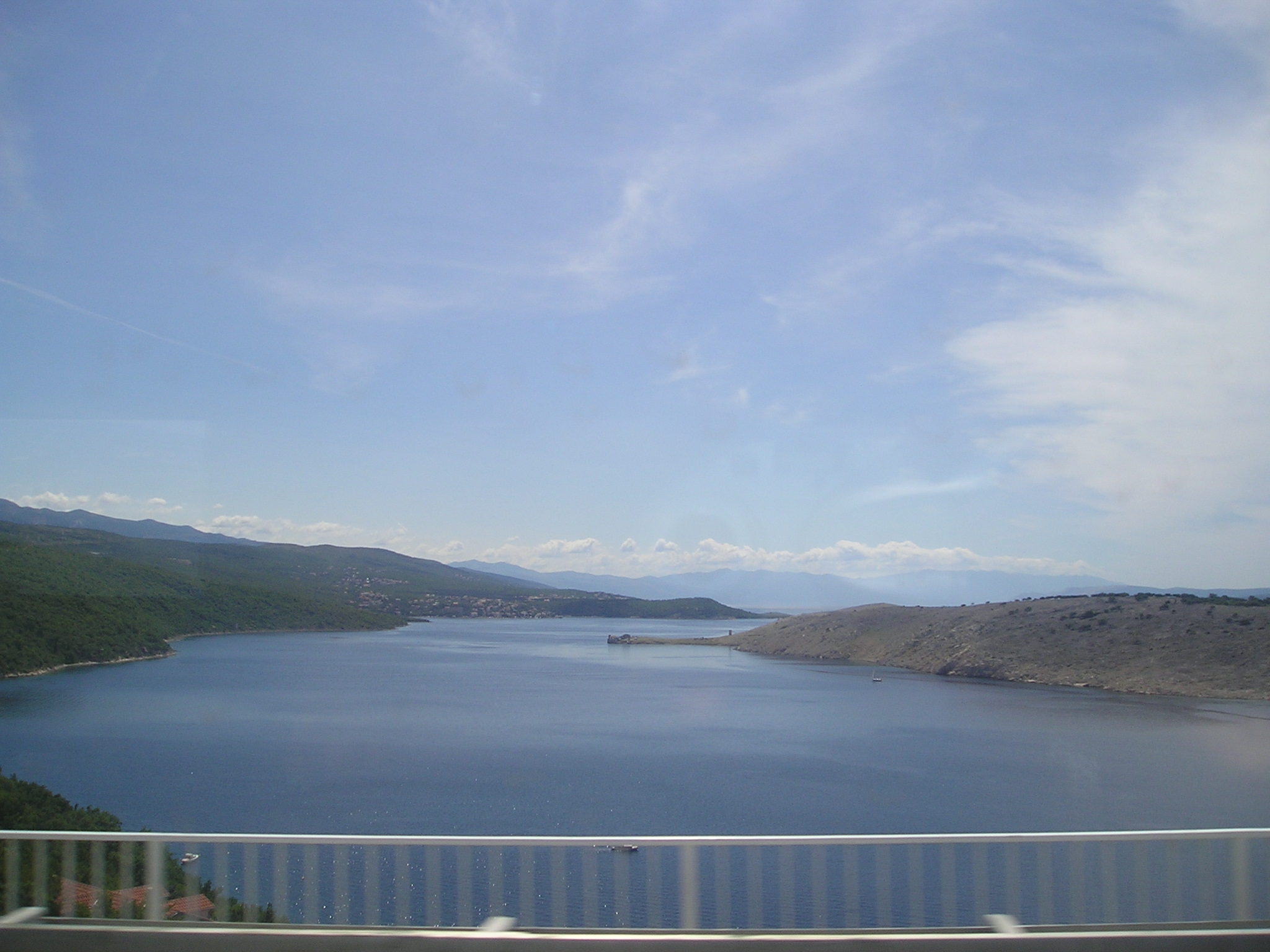 Vista della terraferma e inizio isola di Veglia